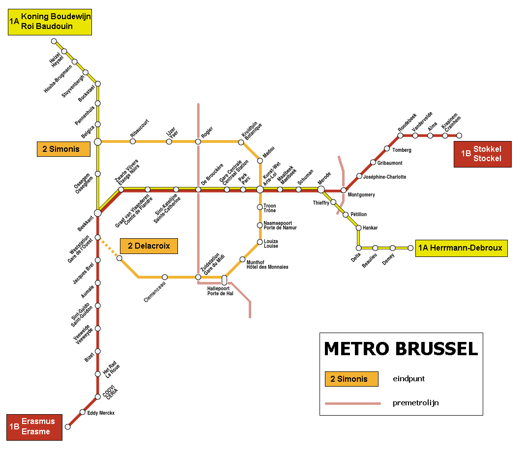 A brüsszeli metró térképe.